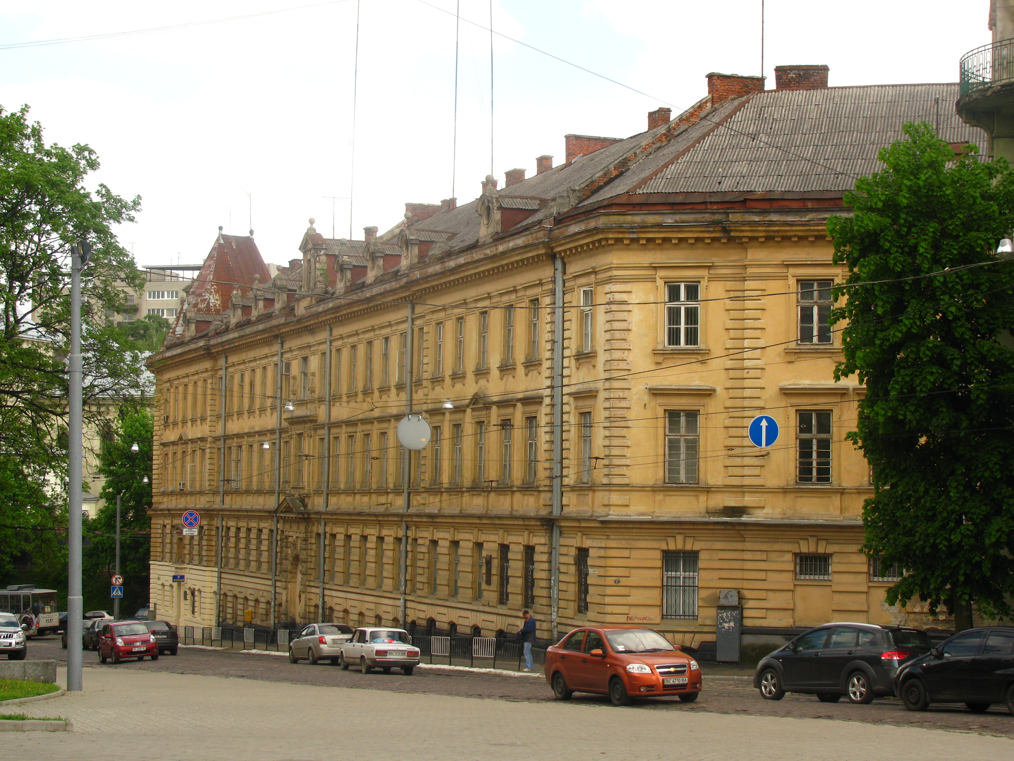 Тюрма на Лонцького з площі Шашкевича.jpg: вигляд на фасад Тюрми на Лонцького з площі Шухевича